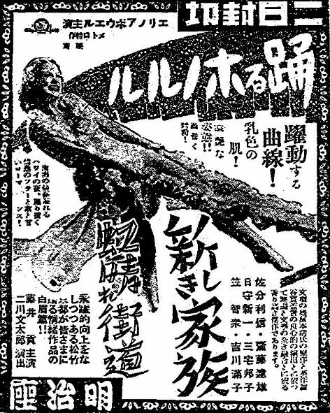 明治座の新聞広告、1939年10月2日付。